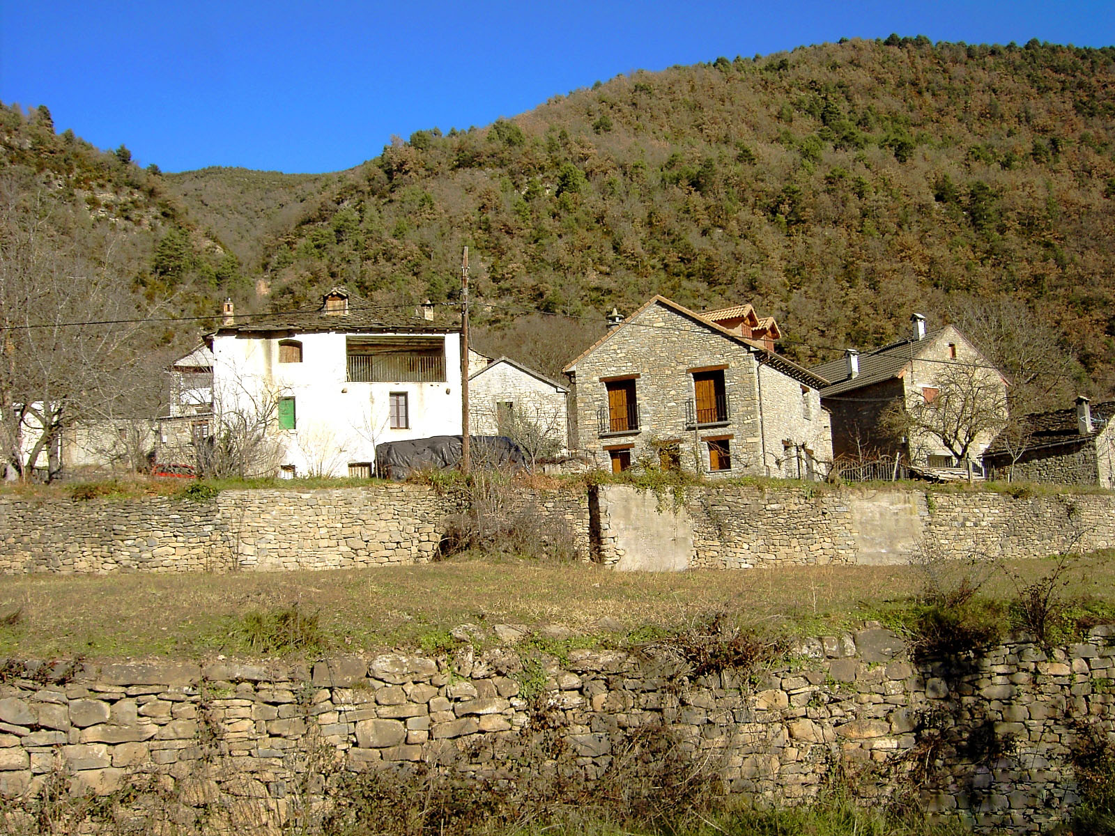 Arresa, cerca del núcleo de Fiscal (Huesca).